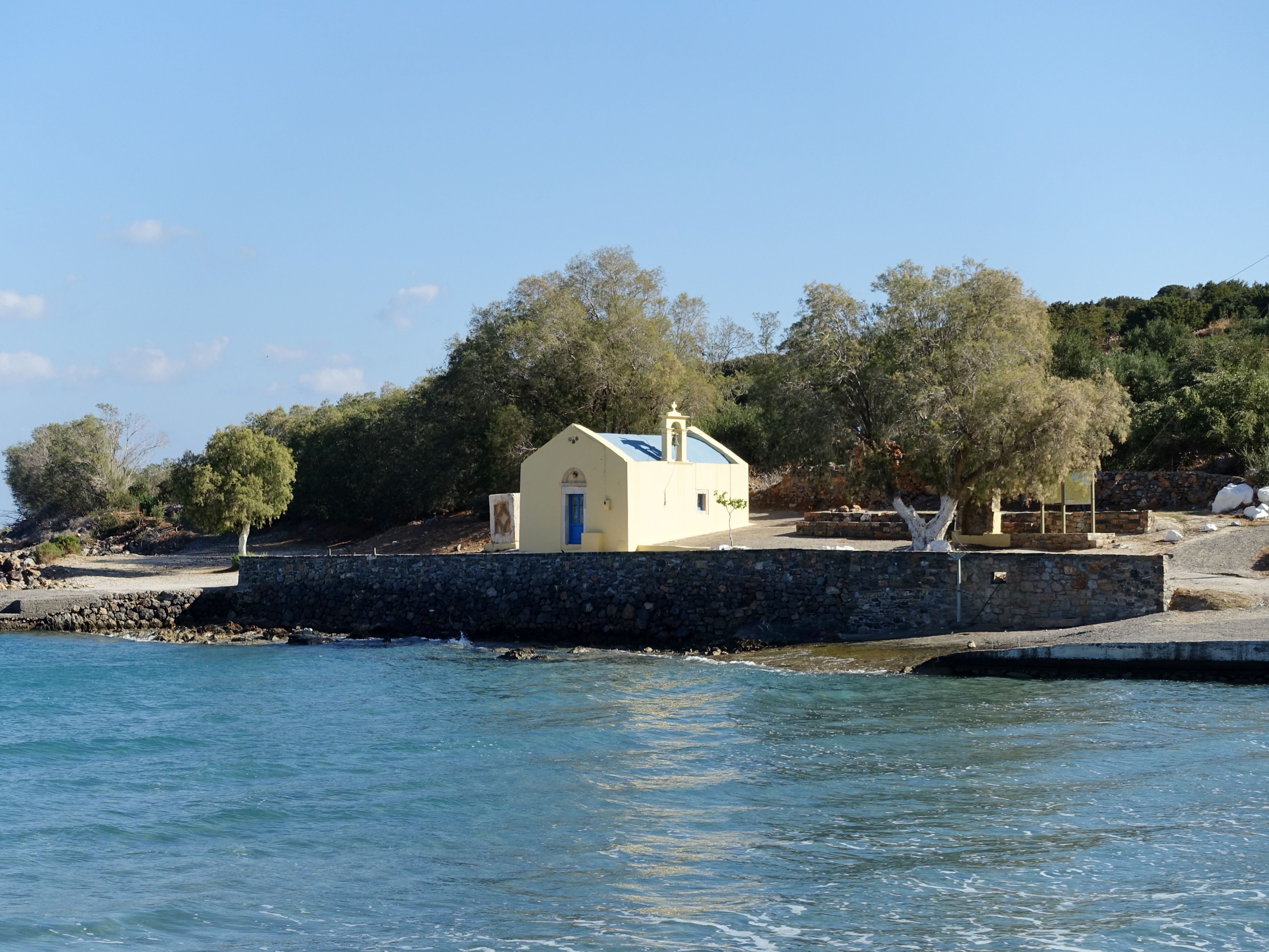 Kirche Agios Pandeleimon (Ιερός Ναός Αγίου Παντελεήμονος) an der Nordküste Kretas bei Istro (Ίστρο), Ortsgemeinschaft Kalo Chorio (Καλό Χωριό), Gemeinde Agios Nikolaos, Kreta, Griechenland